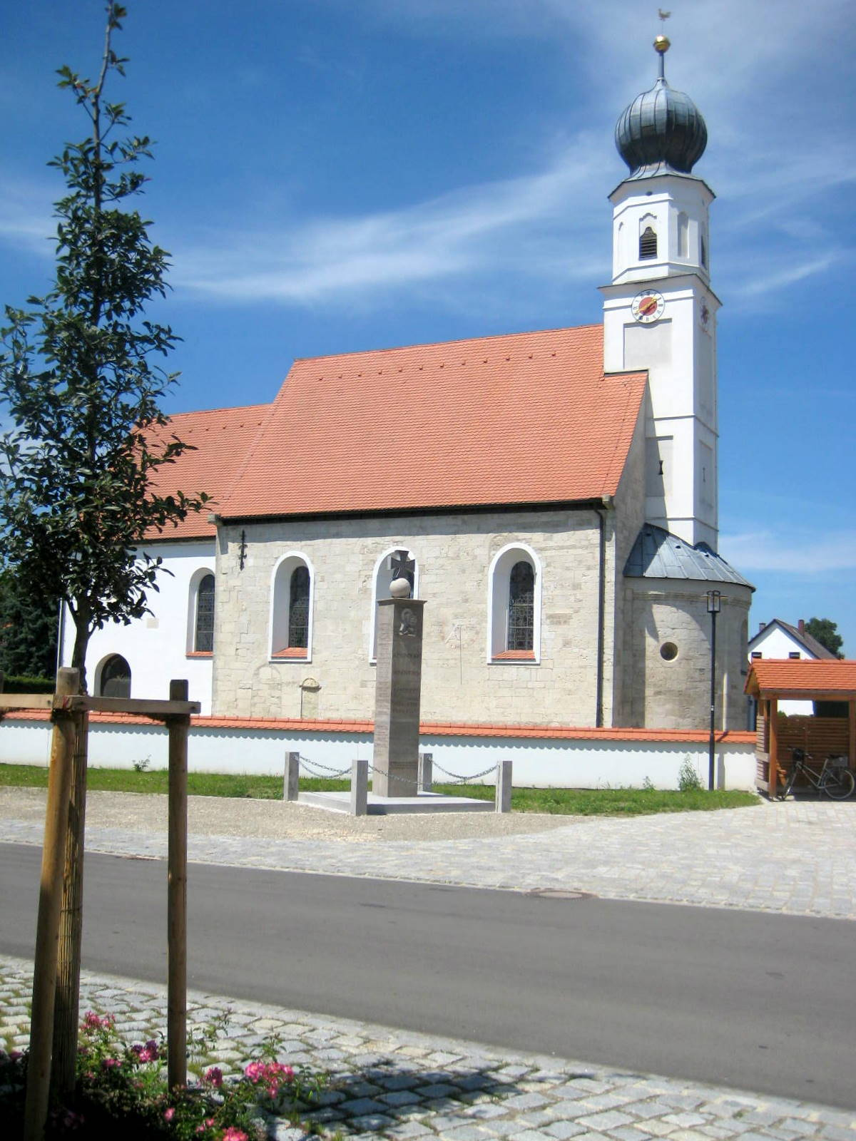 Ilmendorf gehört zu Geisenfeld, dieses ist eine Gemeinde des LKr. Pfaffenhofen a.d. Ilm.